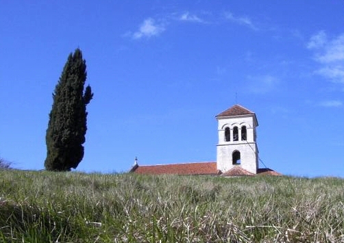 Église Sainte-Madeleine de Montagrier